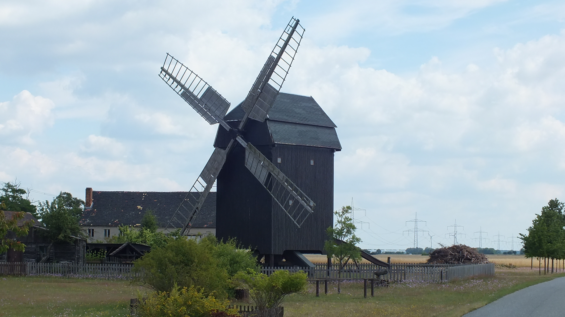 denkmalgeschützte Mühle in Lebien